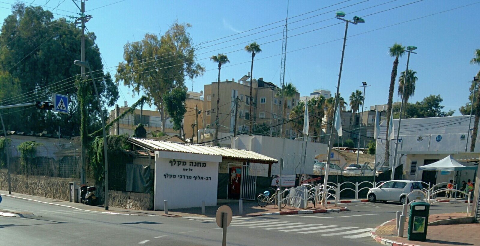 מחנה מקלף (השלישות רמת גן)